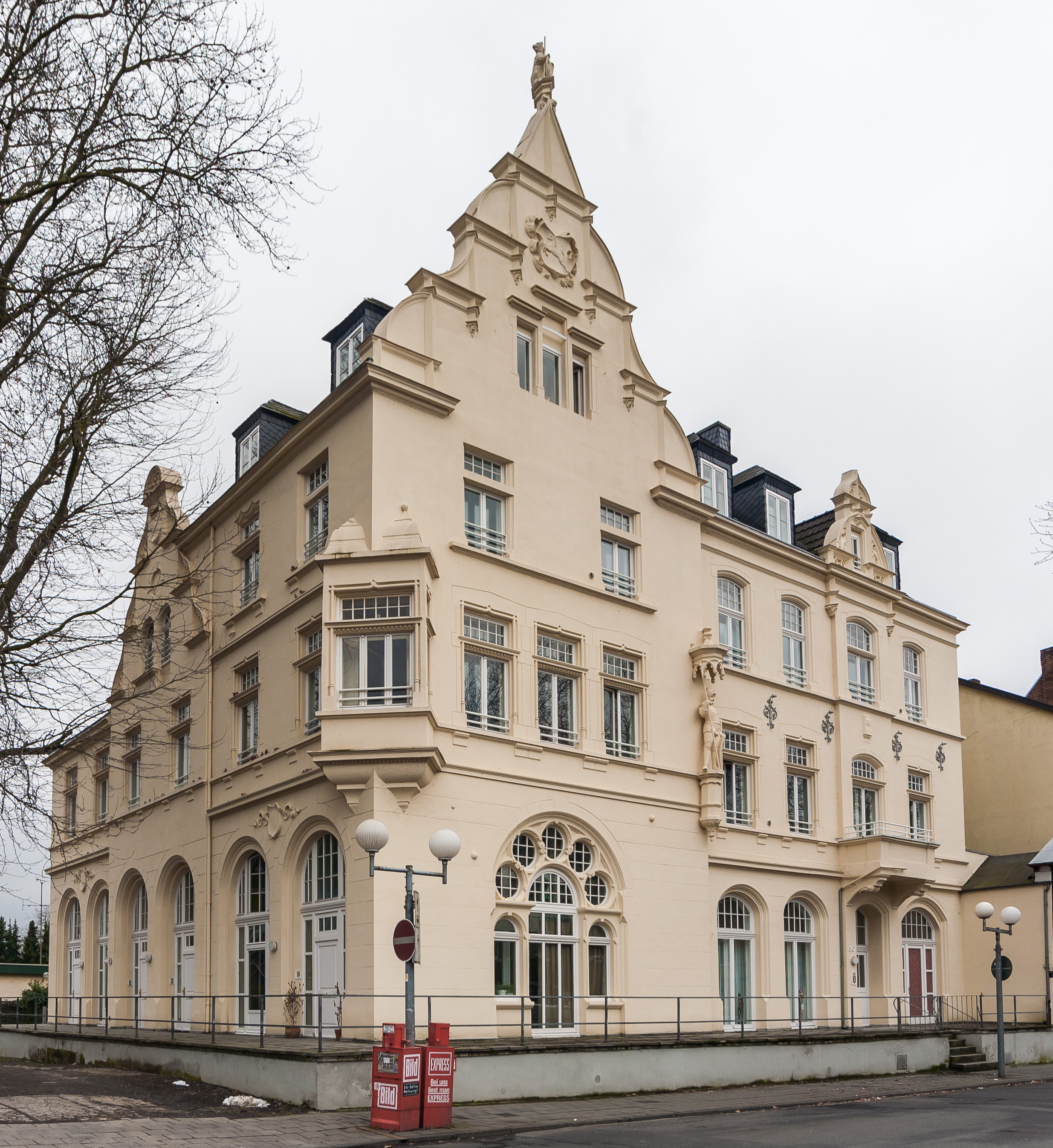 Denkmalgeschützter Putzbau (erbaut 1897; ehemaliges Hotel Westfalenhof), Drachenfelsstraße 30, Königswinter